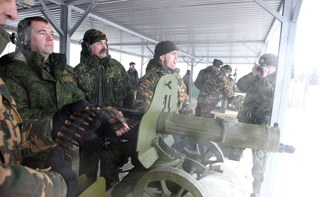 Близ Солнечногорска, на полигоне «Выстрел» Дмитрий Медведев осмотрел новую колёсную военную технику, а также выставку раритетного стрелкового оружия. Президент дал очередь из пулемёта «Максим».